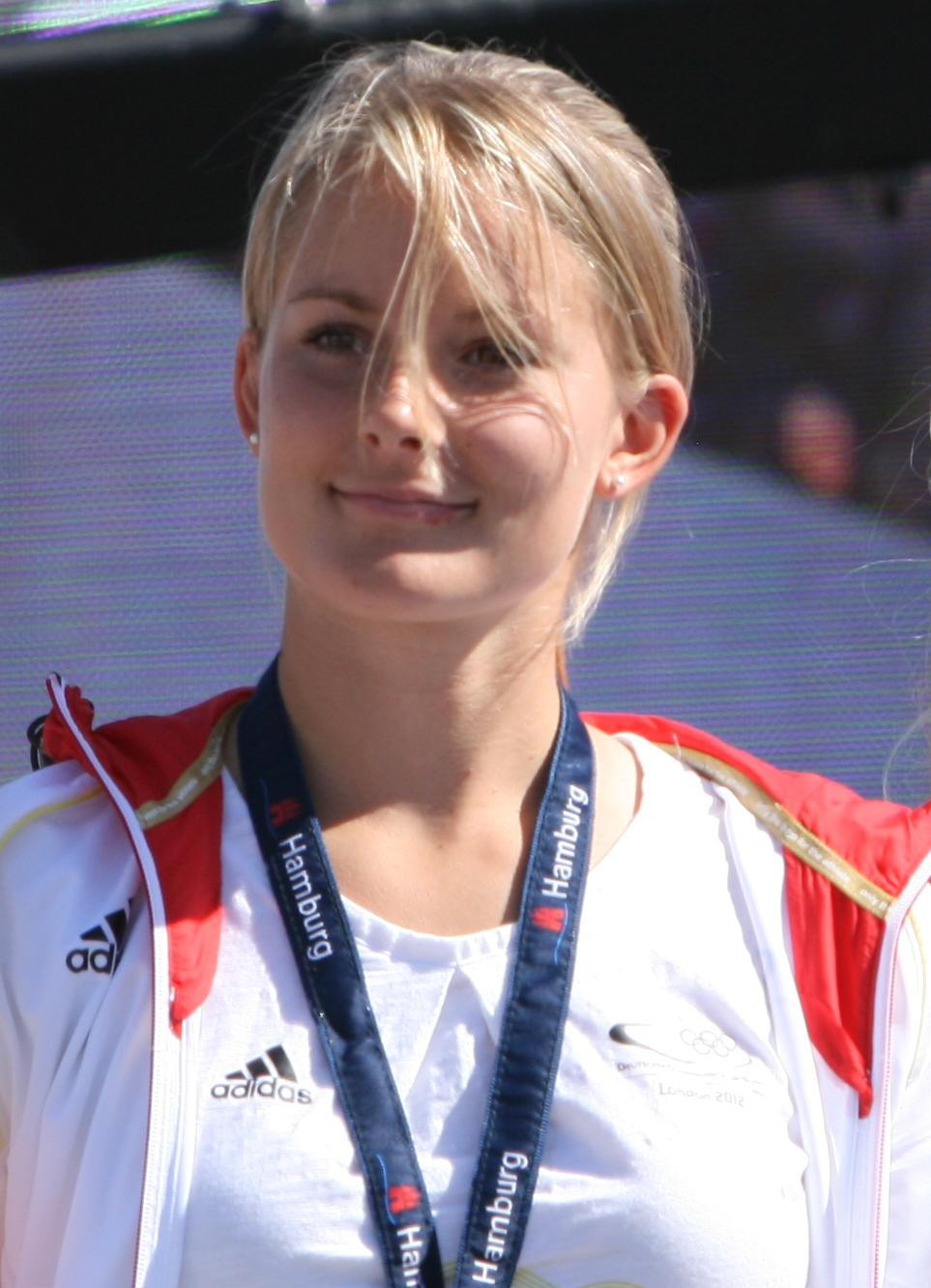 Hockeyspielerin Anke Brockmann beim Empfang der Olympioniken in Hamburg